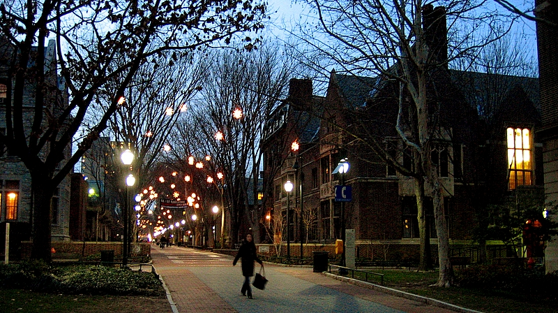 Winter at UPenn